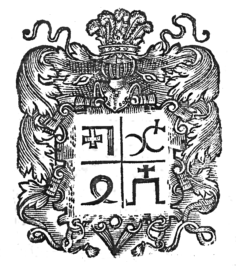 Герб родини Сенют (Сенютовичів).